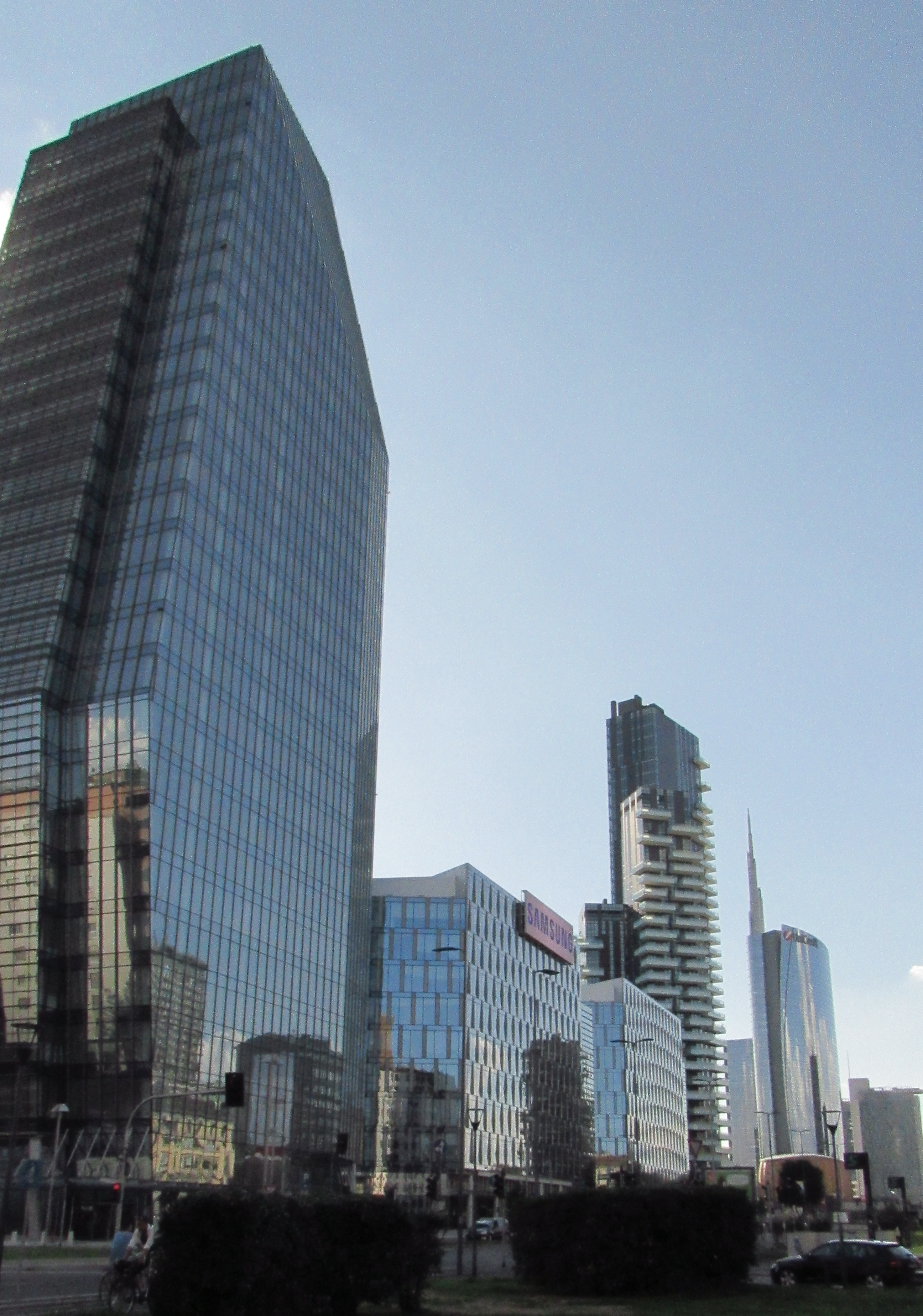 Scorcio Viale Liberazione, Milano